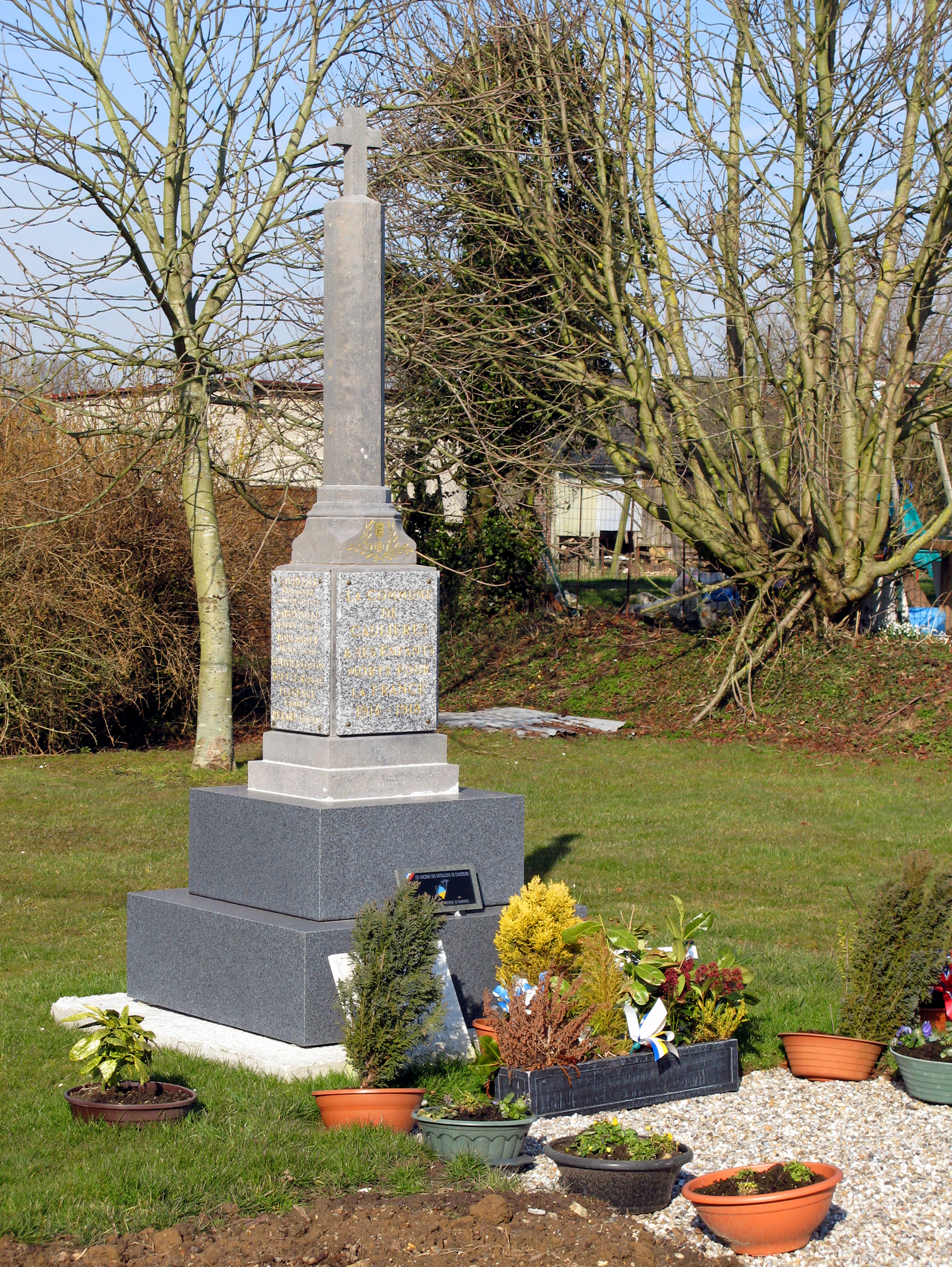 Caulières (Somme, France) - Le monument aux morts, surmonté d'une croix chrétienne. . .